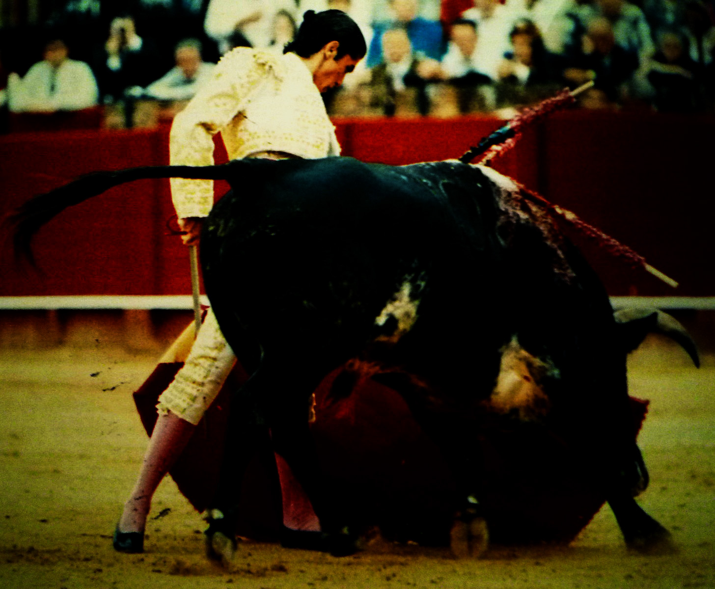 Javier Condé Naturelle Palavas